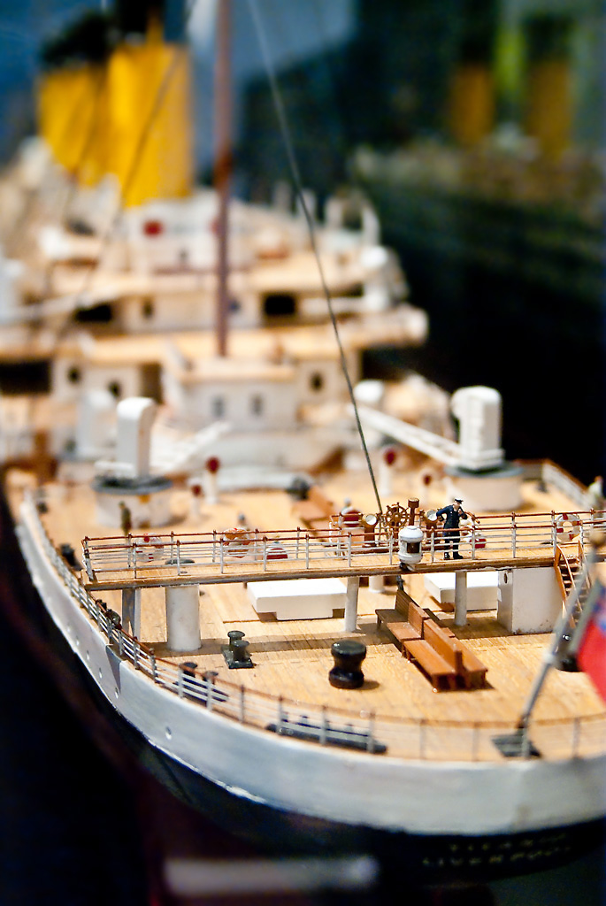 Skeepsmodel van die RMS Titanic.